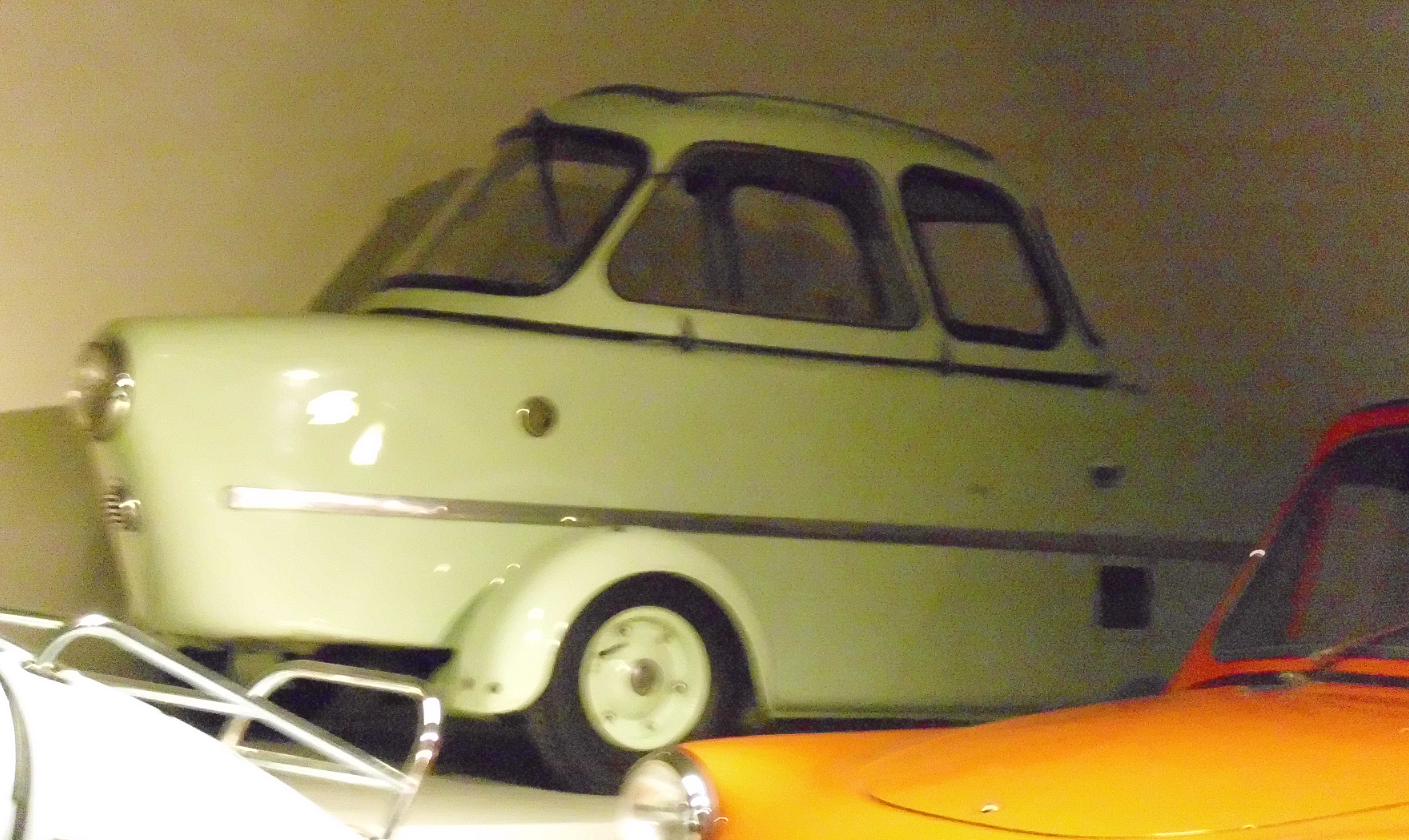 Inter 1955